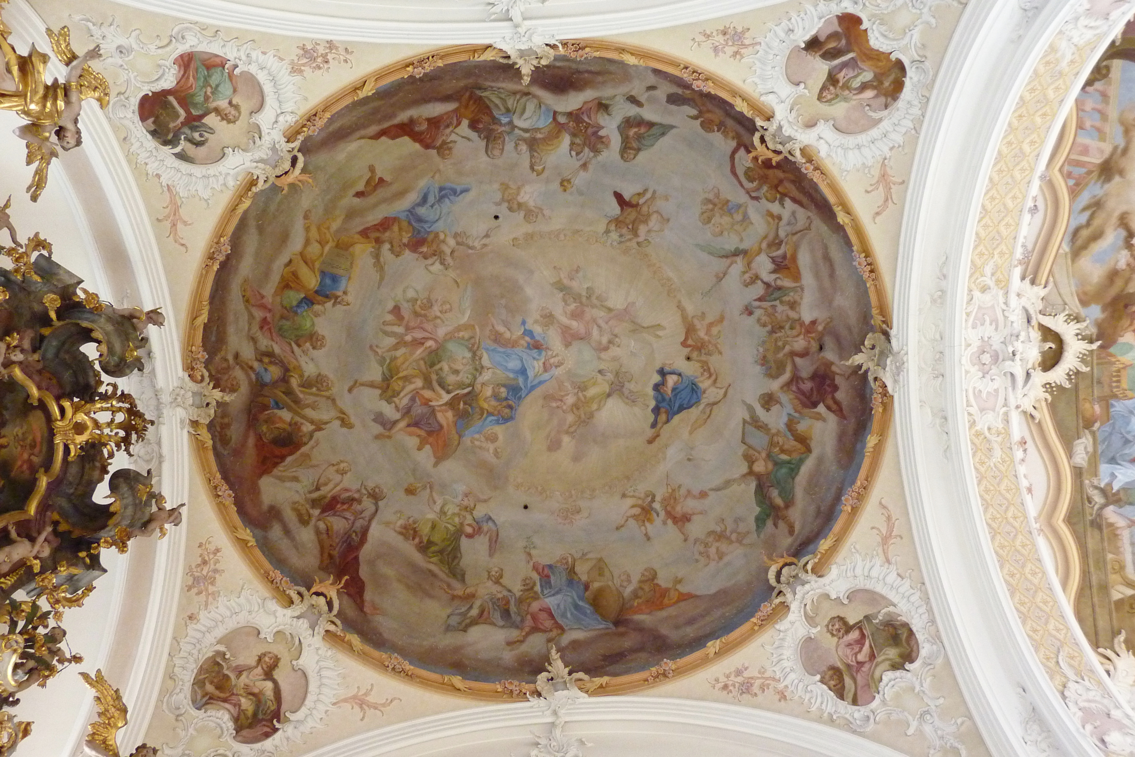 Katholische Pfarrkirche St. Vitus in Donaualtheim (Dillingen an der Donau), Kuppelfresko des Chores mit der Darstellung der Krönung Mariens und Szenen aus dem Alten Testament wie die Arche Noah, Abraham opfert seinen Sohn Isaak, König David mit der Harfe und Moses mit den Gesetzestafeln; in den Zwickeln die vier Evangelisten mit ihren Symbolen.